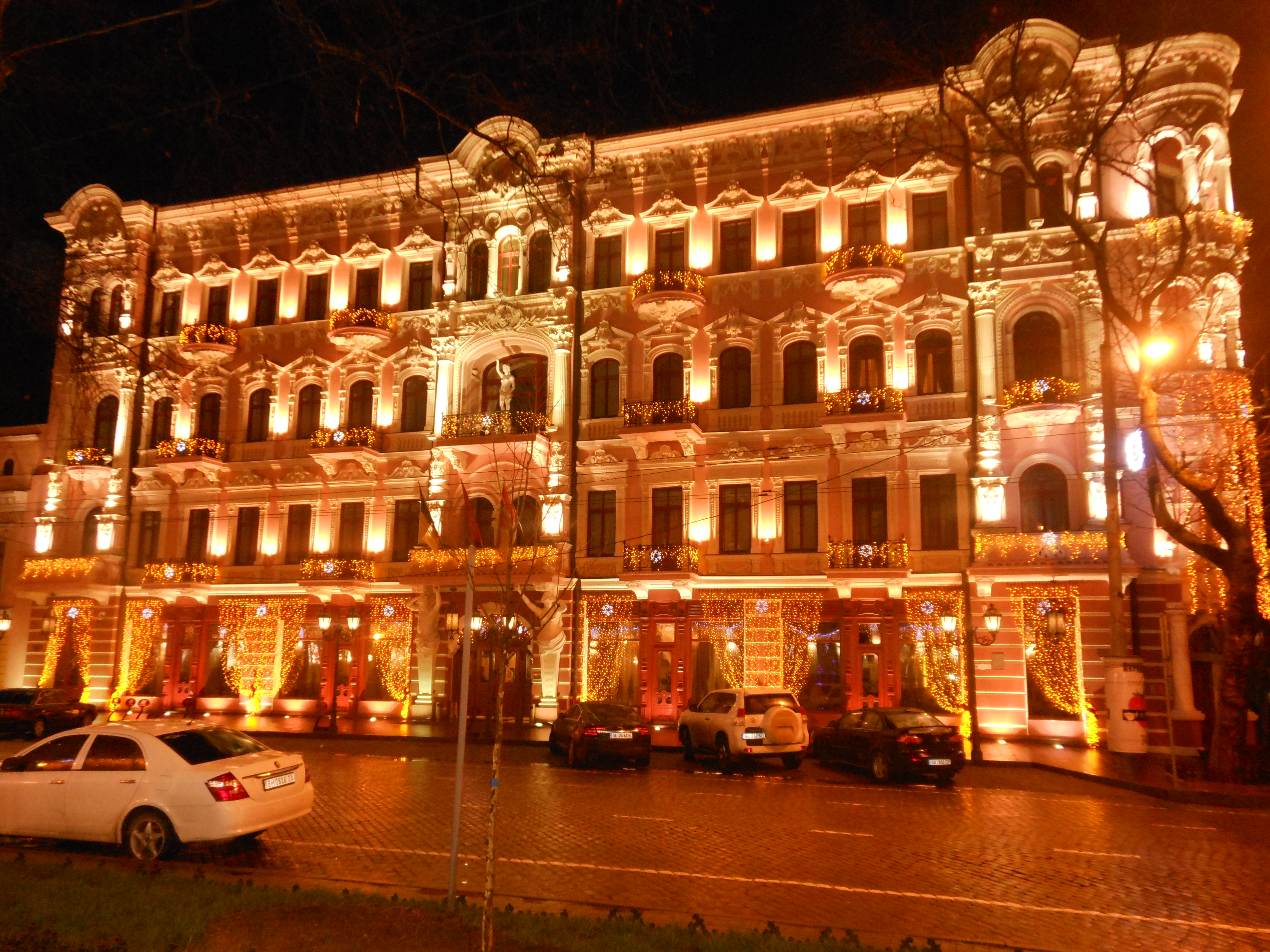 Готель “Брістоль”. Готель «Красная», де жили:-у січні 1926 р. великий американський письменник Теодор Драйзер;-у 1929 р. французький письменник Анрі Барбюс;-у 1940 р. італійський письменник Джовані Джермането;-22-25 травня 1941 р. німецький письменник Віллі. Бредель;-8-21 жовтня 1935 р. німецький письменник-антифашист Фрідрих Вольф;- у 1925 р. поет Демьян Бєдний, Одеса, вул. Пушкінська, 15/14 (ріг вулиць Пушкінської, 15 та Буніна, 14)